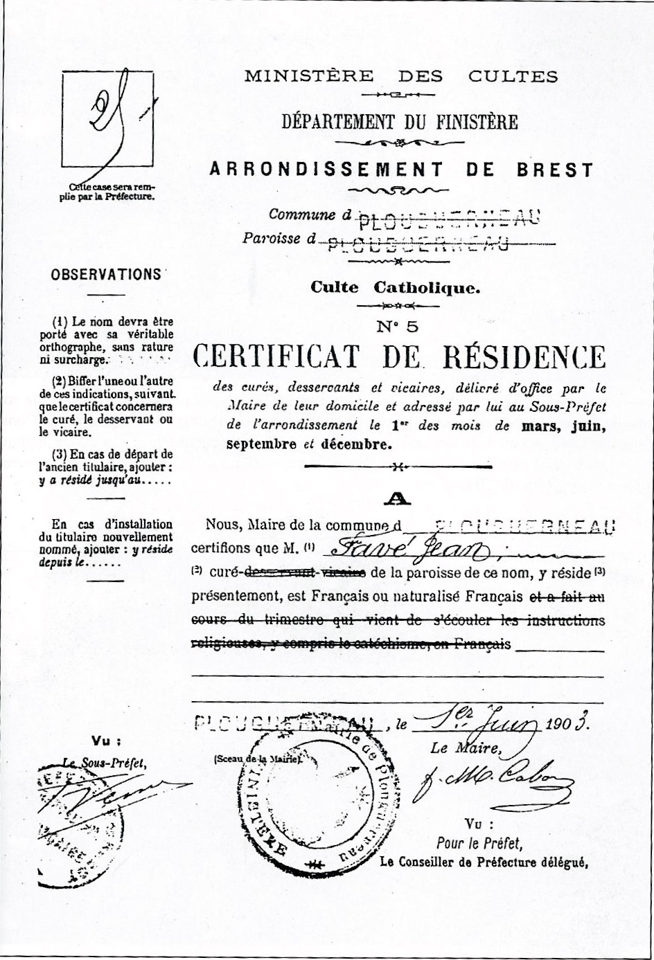 Certificat de résidence n°5 comprenant l'ajout "a fait au cours du trimestre qui vient de s'écouler les instructions religieuses, y compris le catéchisme, en français" ; cet ajout a été rayé par le maire de Plouguerneau (plusieurs autres maires en firent autant), refusant de dénoncer les prêtres qui continuaient à prêcher et à faire le catéchisme en breton, ces prêtres s'exposant alors à une suspension de leur traitement.